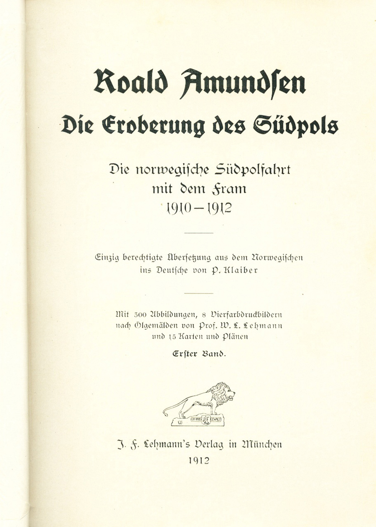 Portada. Roald Amundsen. "Die Eroberung des Südpols. München 1912